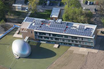 Vue aérienne siège social JF Cesbron (bâtiment à énergie positive)